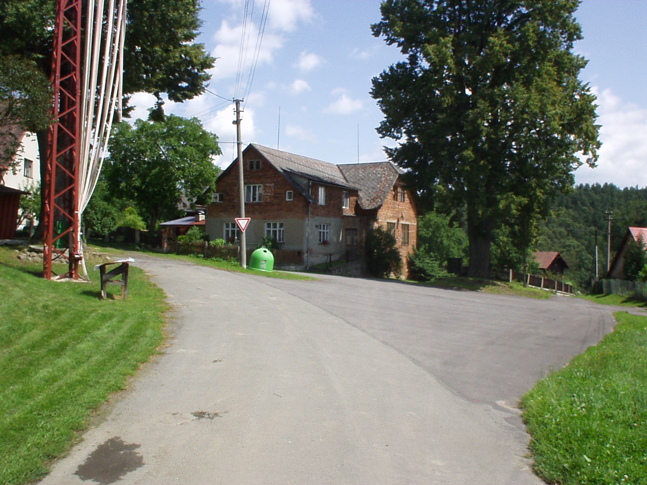 Hradčany (okres Liberec) - náves